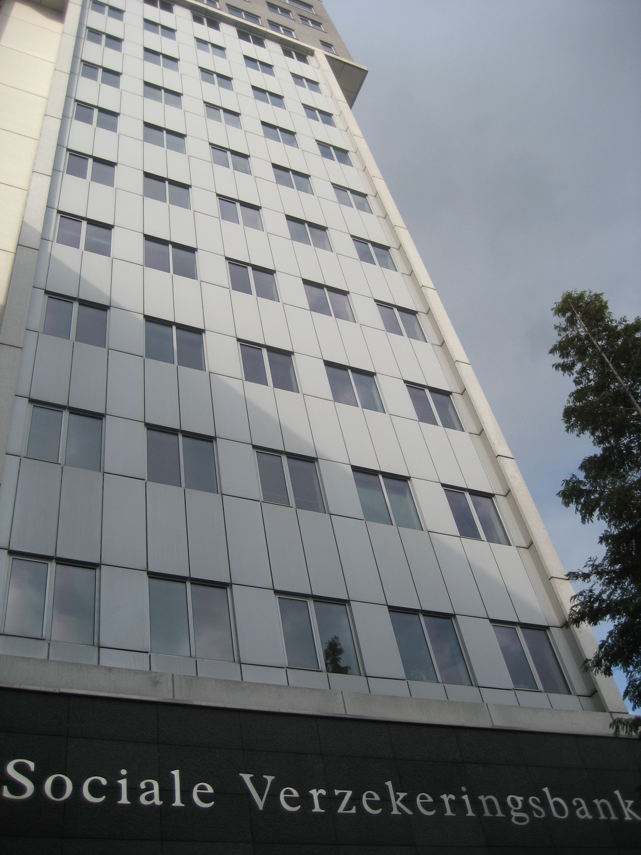 Sociale Verzekeringsbank (SVB), Leiden (Nederland)